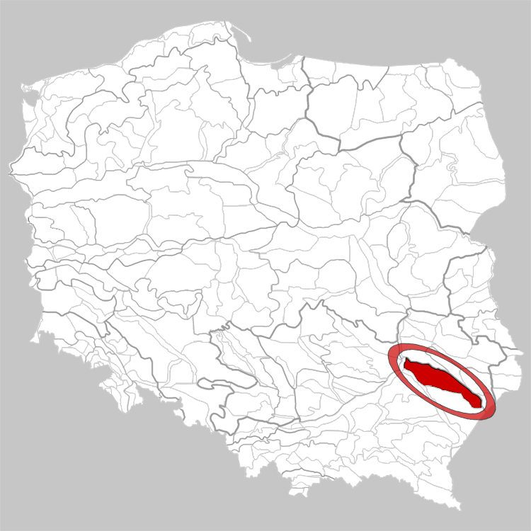 Physico-geographical regionalization of Poland Mezoregion 512.47 Biłgoraj Plain Regionalizacja fizycznogeograficzna Polski Mezoregion 512.47 Równina Biłgorajska